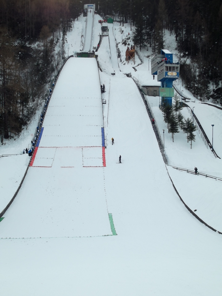 Zdjęcie zrobione podczas zawodów Pucharu kontynentalnego Kobiet w Skokach Narciarskich na Średniej Krokwi w Zakopanem.